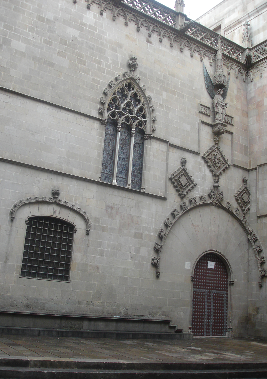 Façana antiga de l'ajuntament de Barcelona (Catalunya, Espanya) - Part dreta